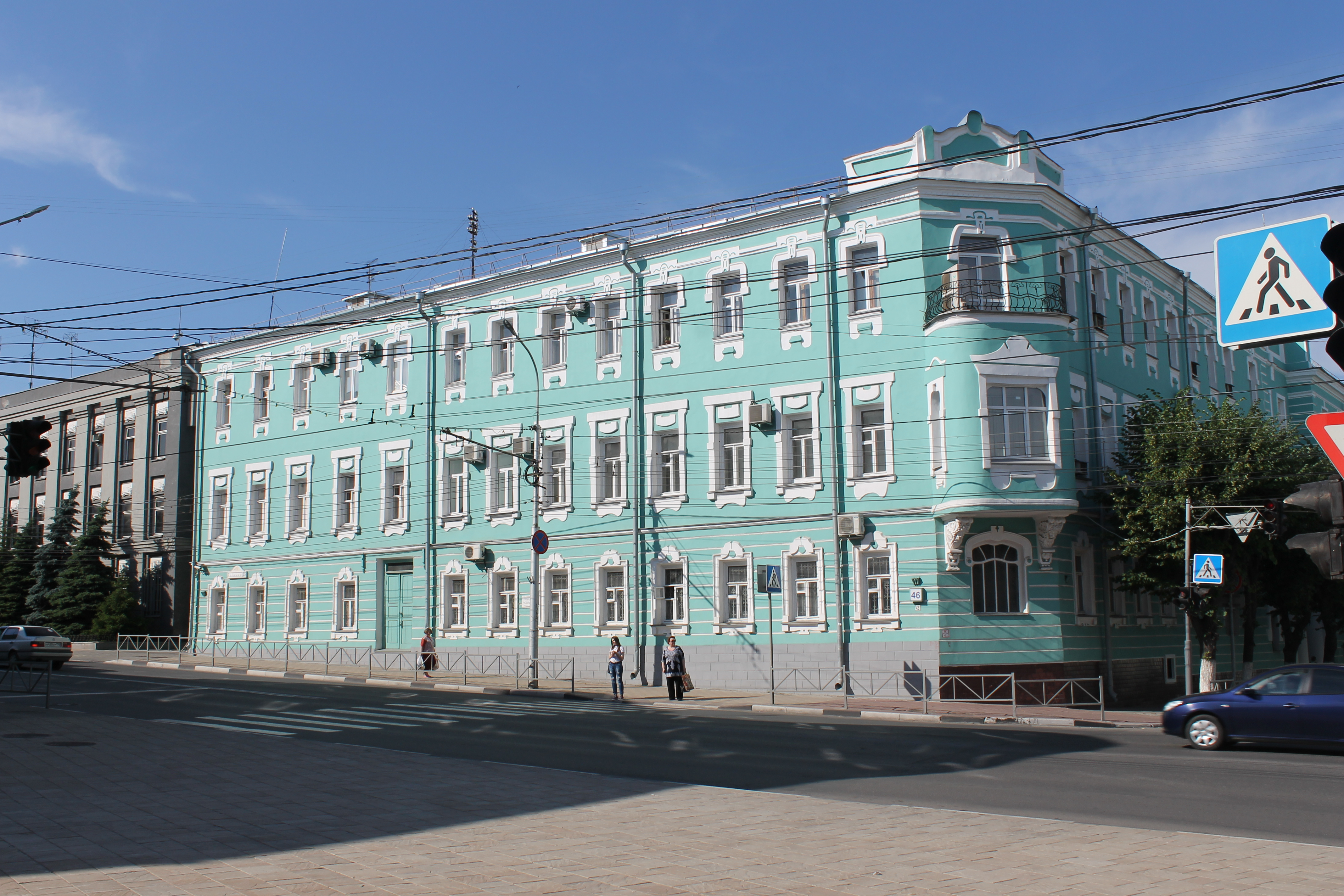 Здание федеральной службы охраны (Рязань)